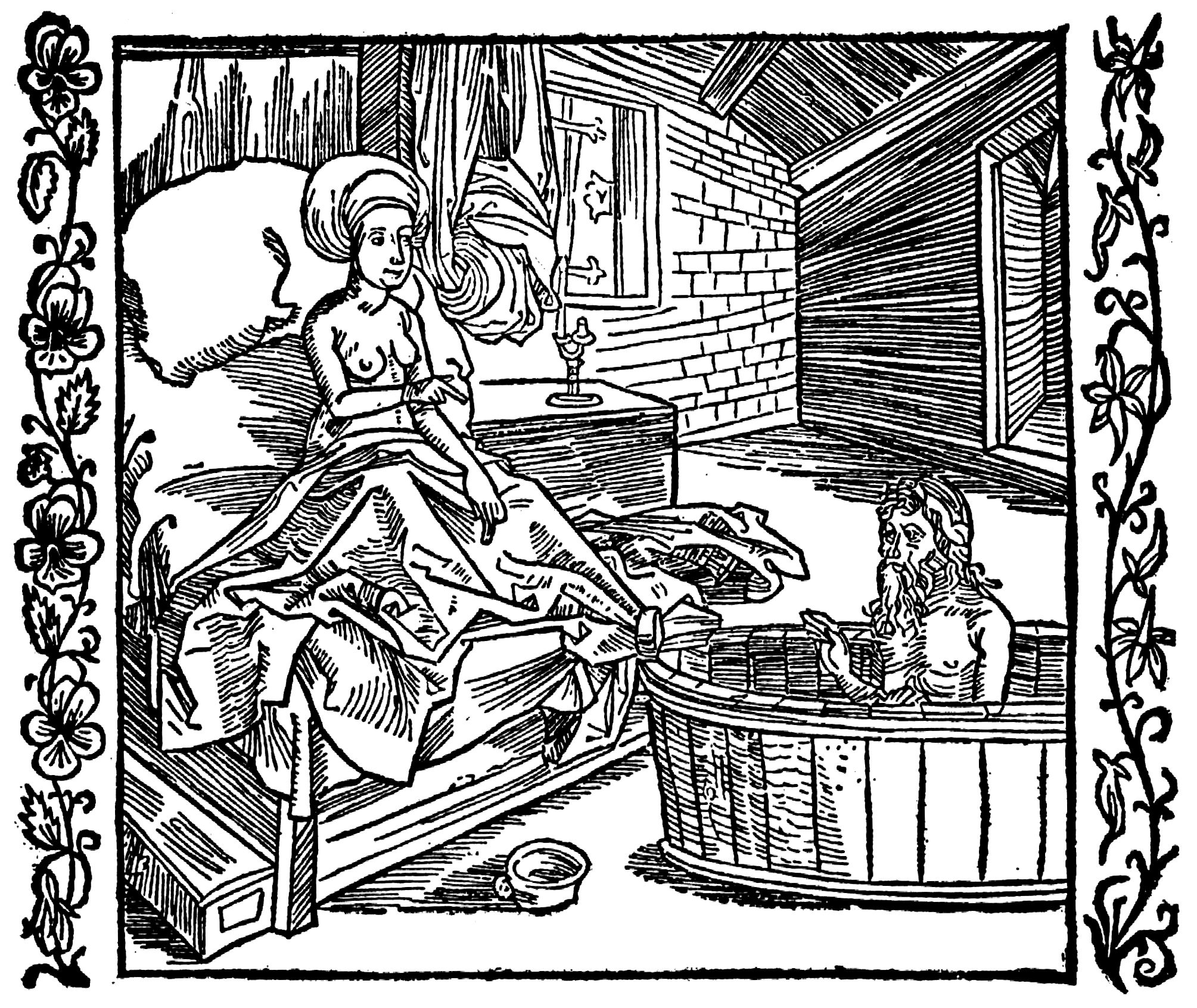 Der Ritter vom Turn. Basel: Michael Furter für J[ohann] B[ergmann], 1493; Illustration zum »Der Ritter vom Turn«, Szene: Die Frau und der badende Einsiedler.